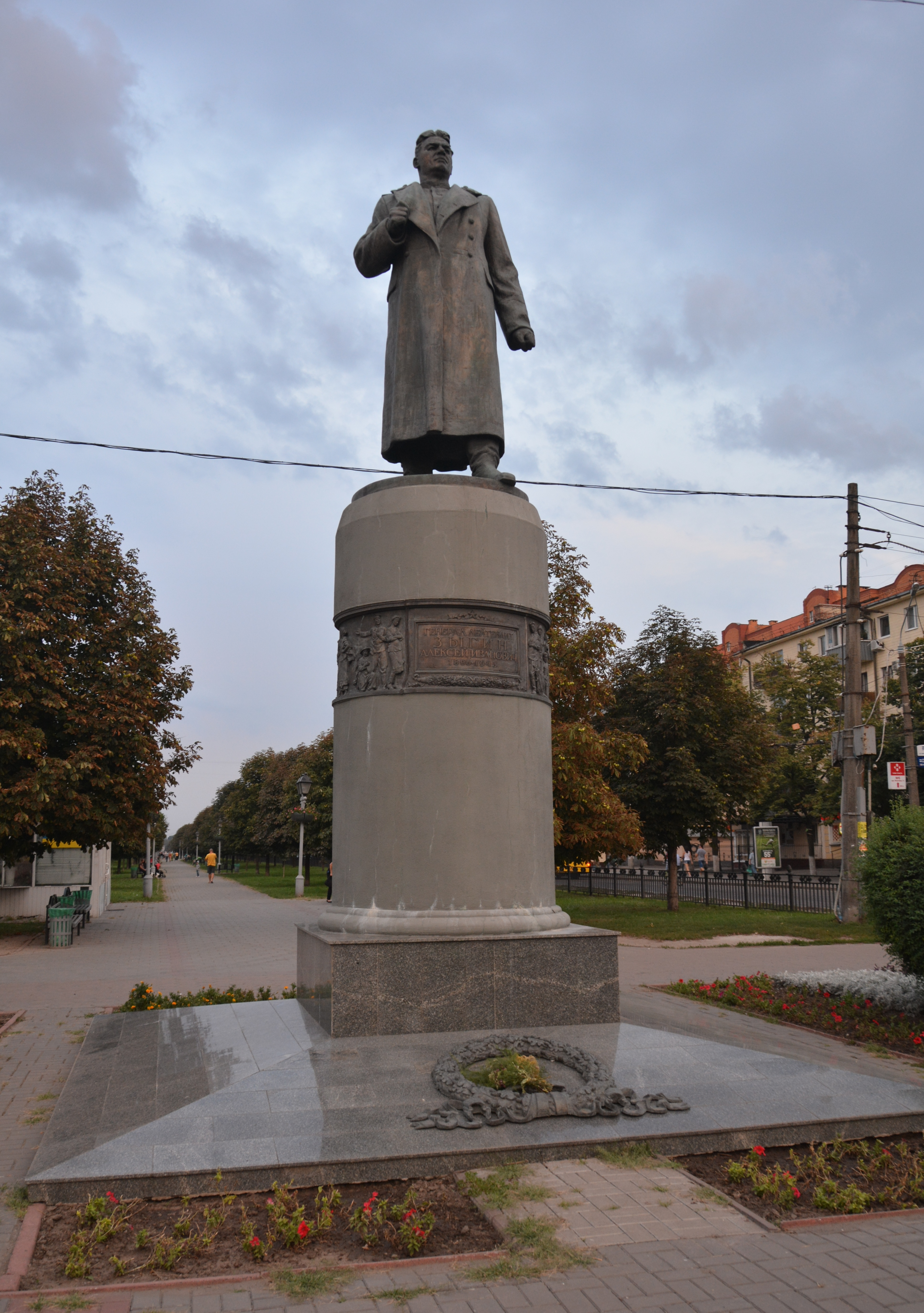 Пам'ятник генерал-лейтенанту О. І. Зигіну, Полтава, пл. Зигіна